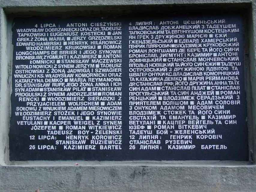 Tablica pomnika Profesorów Lwowskich na Wzgórzach Wuleckich we Lwowie. Autor: Stanisław Kosiedowski.